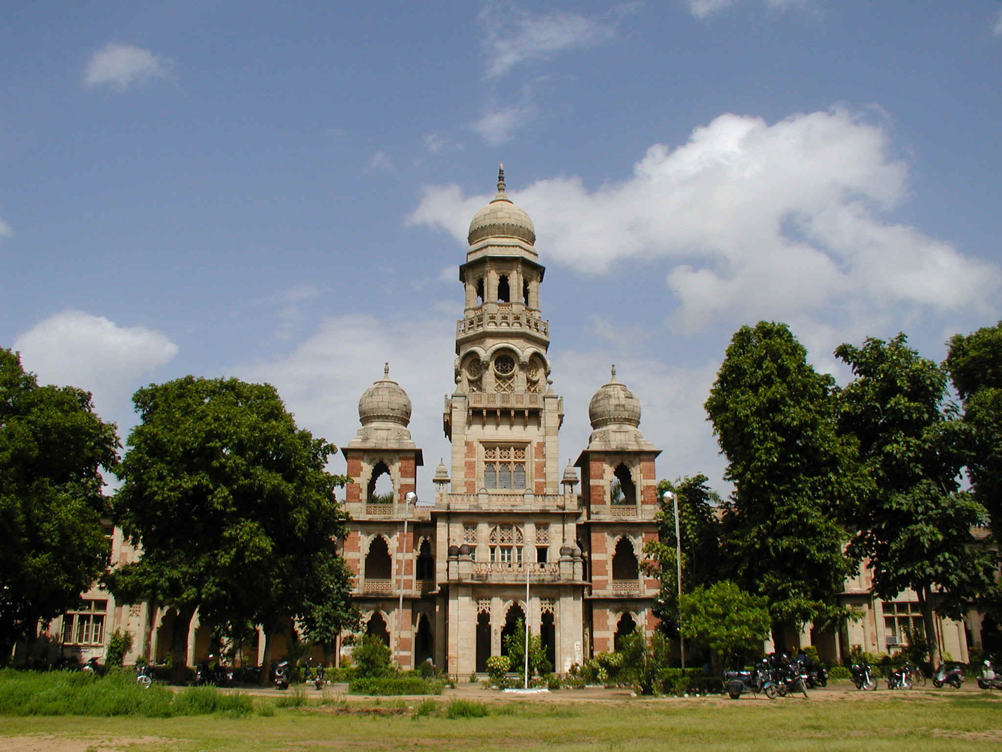 MSU, BARODA